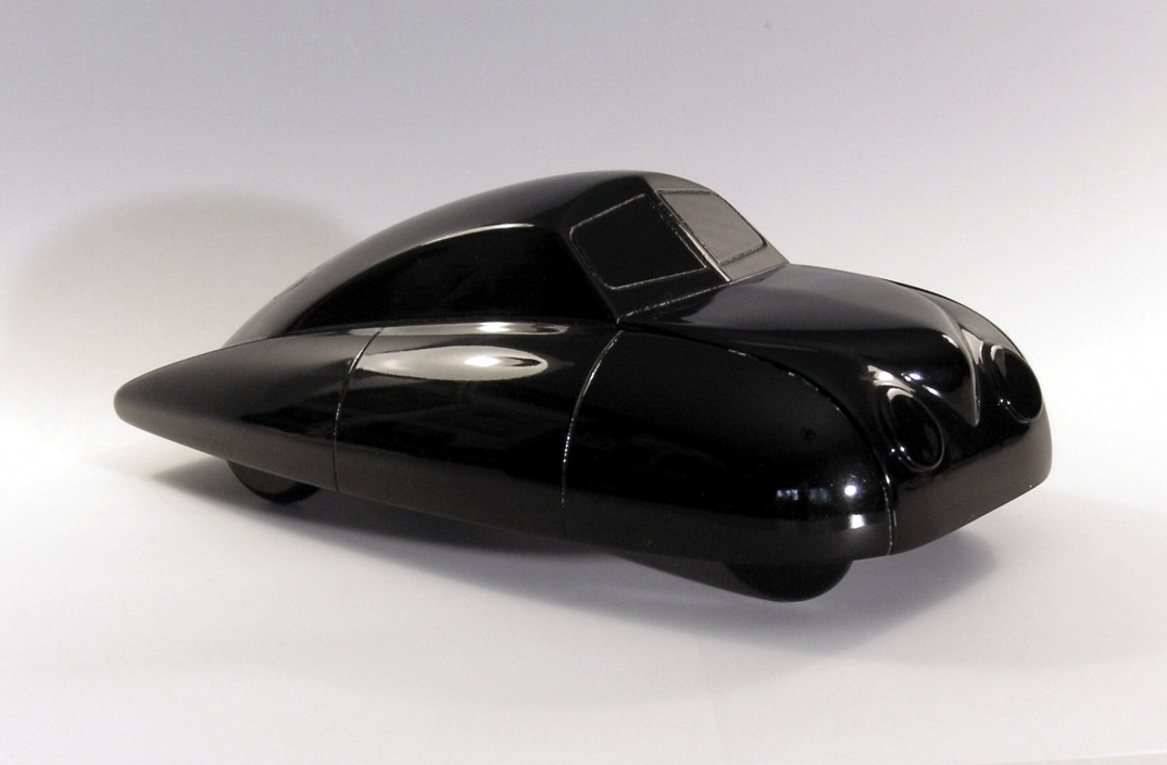 Playsams "Ursaab"